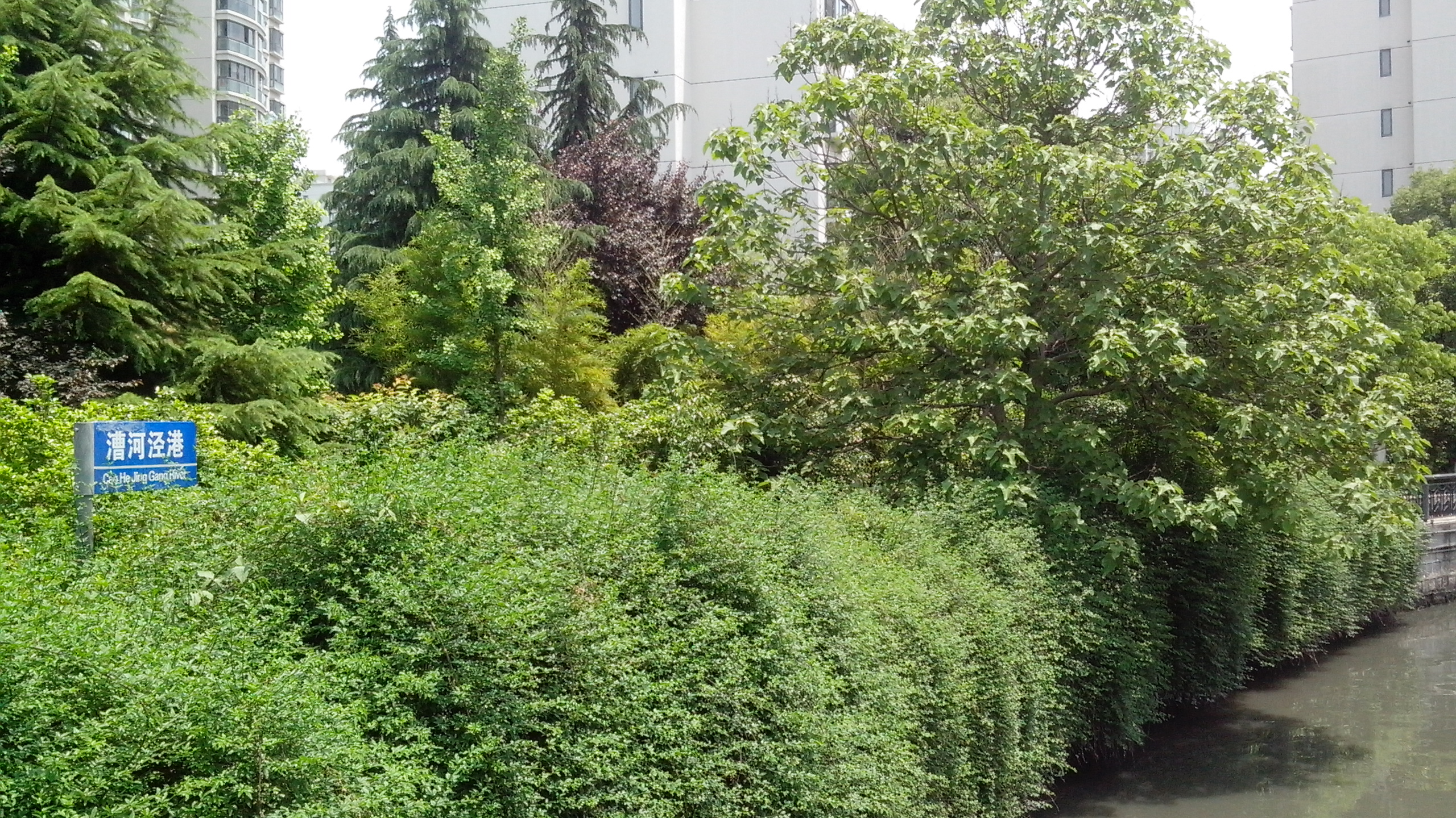 漕河泾港